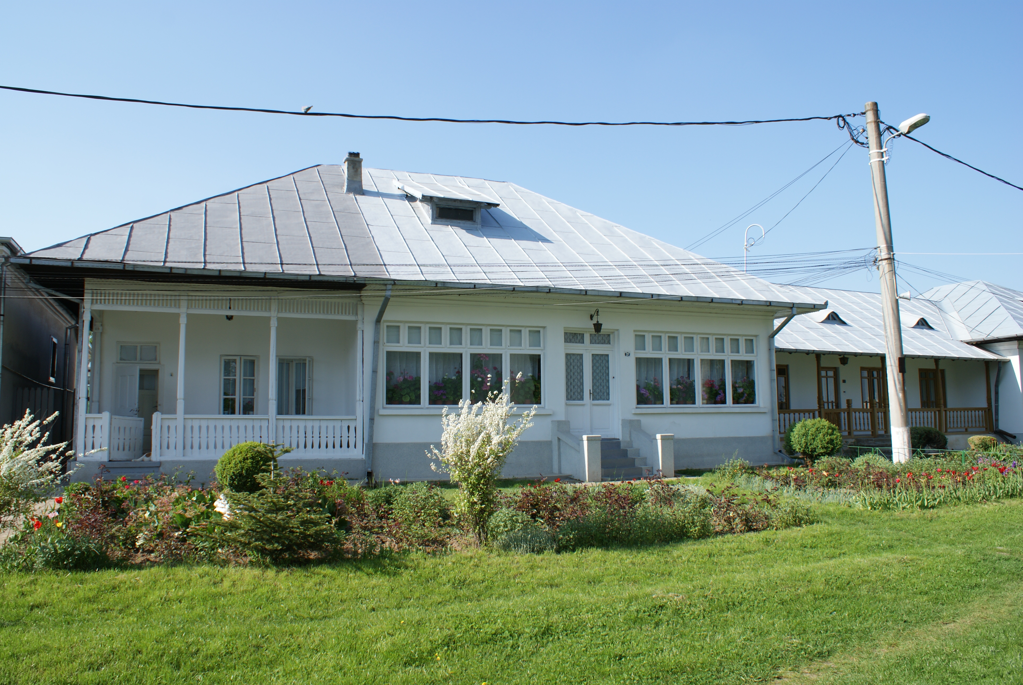 Case monahale 03